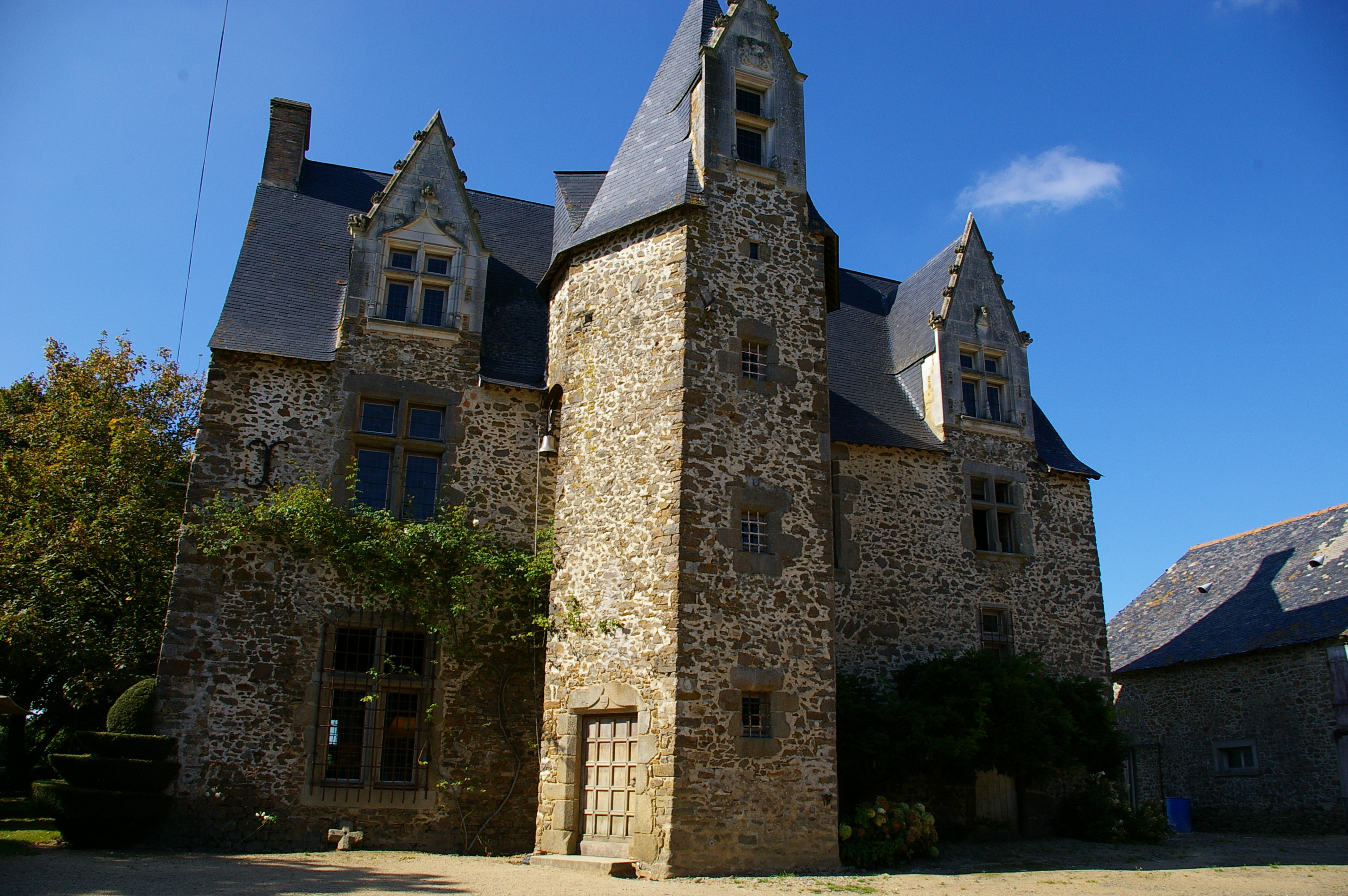 Manoir_d'Aubigné à Vaiges (Mayenne)